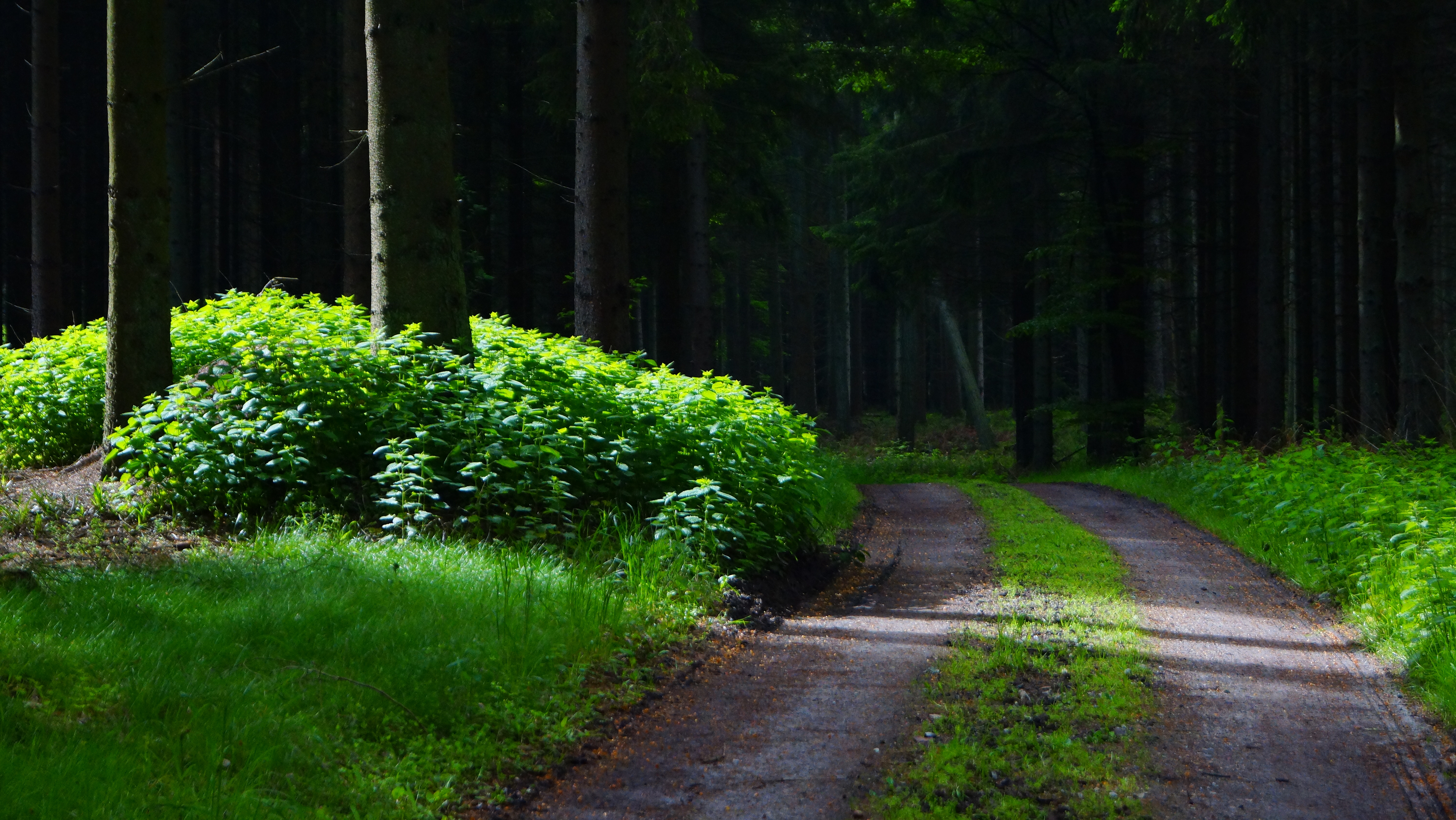 Løvenholm Skov, forår